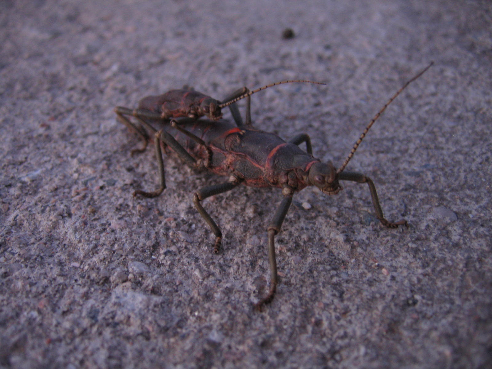 Chinchemolles mâle (petit) et femelle. Période de reproduction.